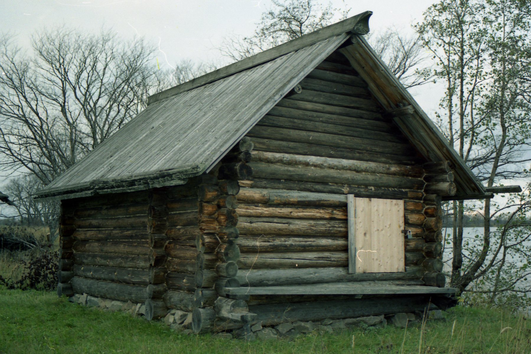 Баня Фошкиной из д. Каскесручей (Республика Карелия, Медвежьегорск, о. Кижи, музей-заповедник деревянного зодчества "Кижи")